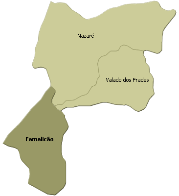 localisation de famalicao sur la freguesia de nazaré